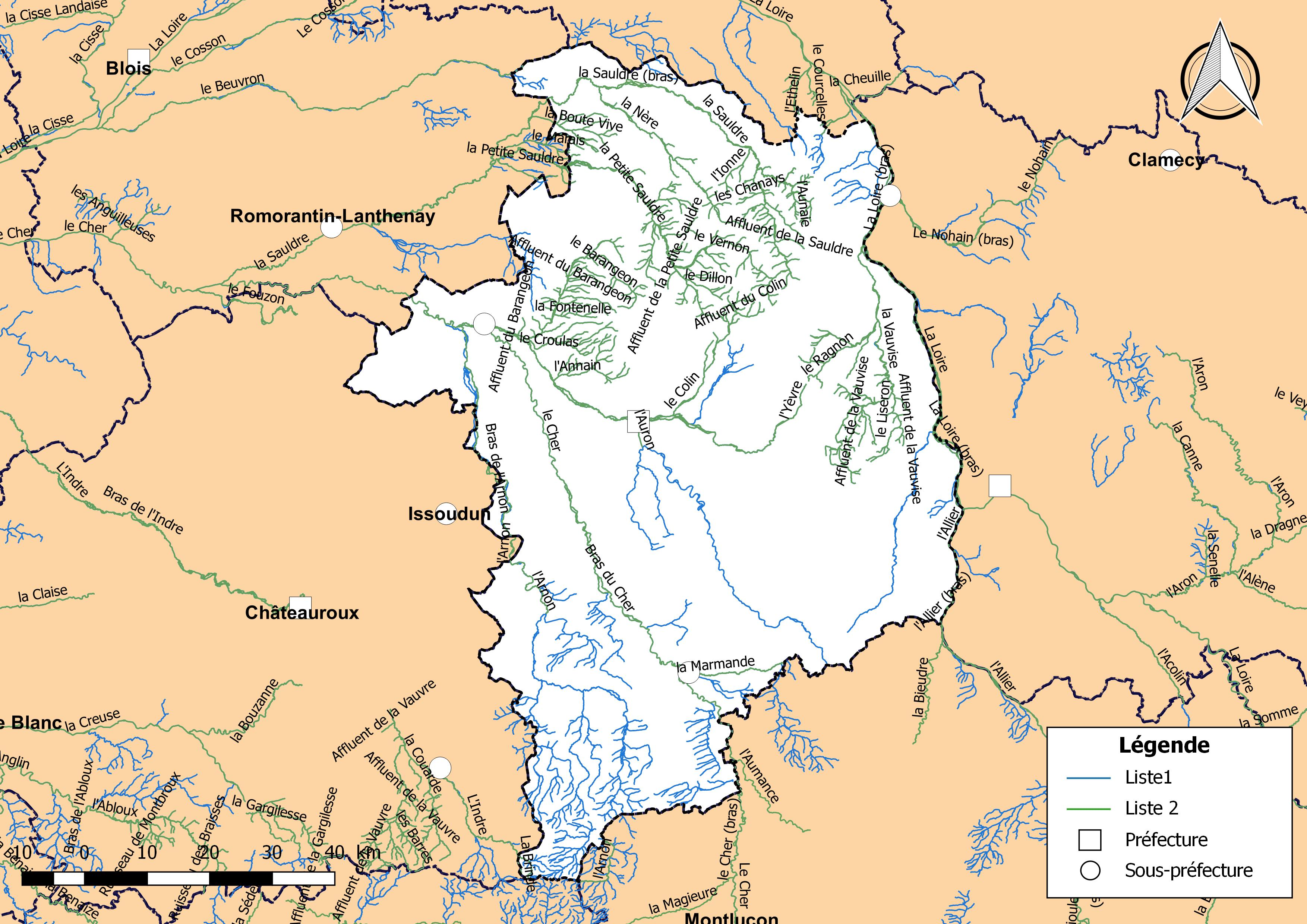 Classement des cours d'eau du département du Cher (France) au titre de la continuité écologique (article L214.17 I du Code de l'environnement).